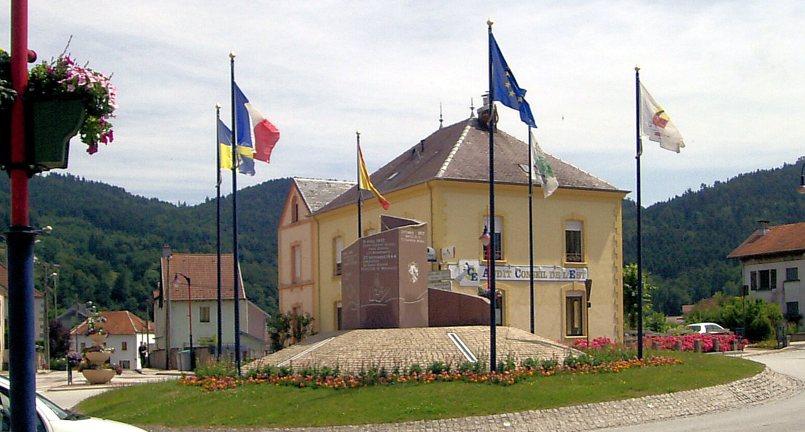 Saint-Étienne-lès-Remiremont, carrefour giratoire (Grand'Rue / Rue de la Moselotte)